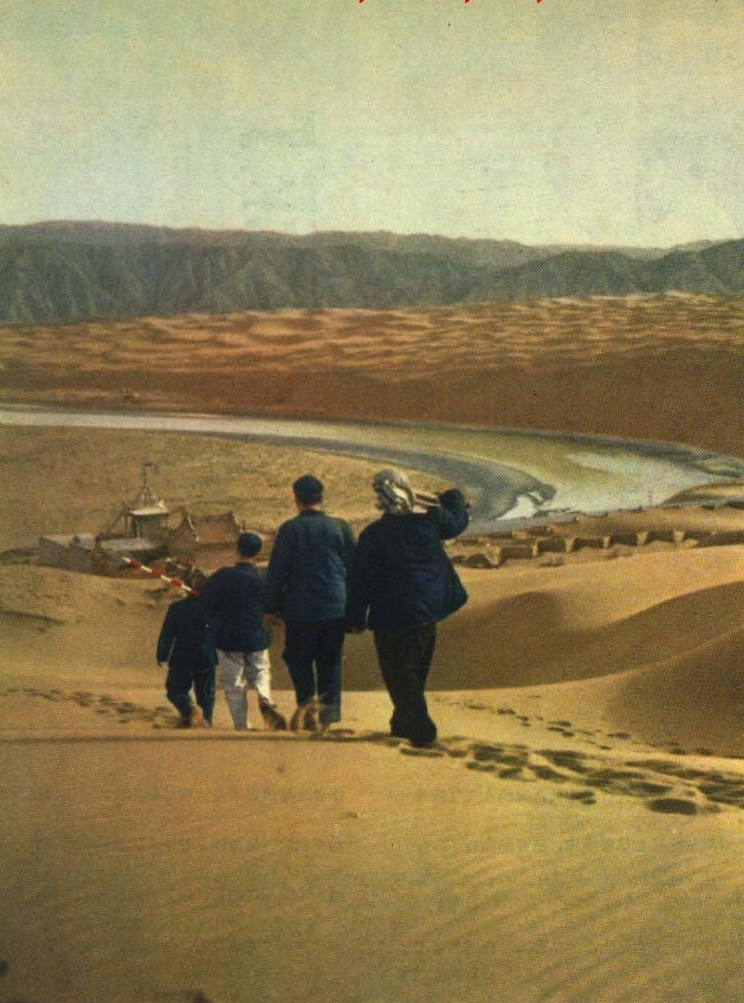 1963-05 1963年 腾格尔的科研考察站